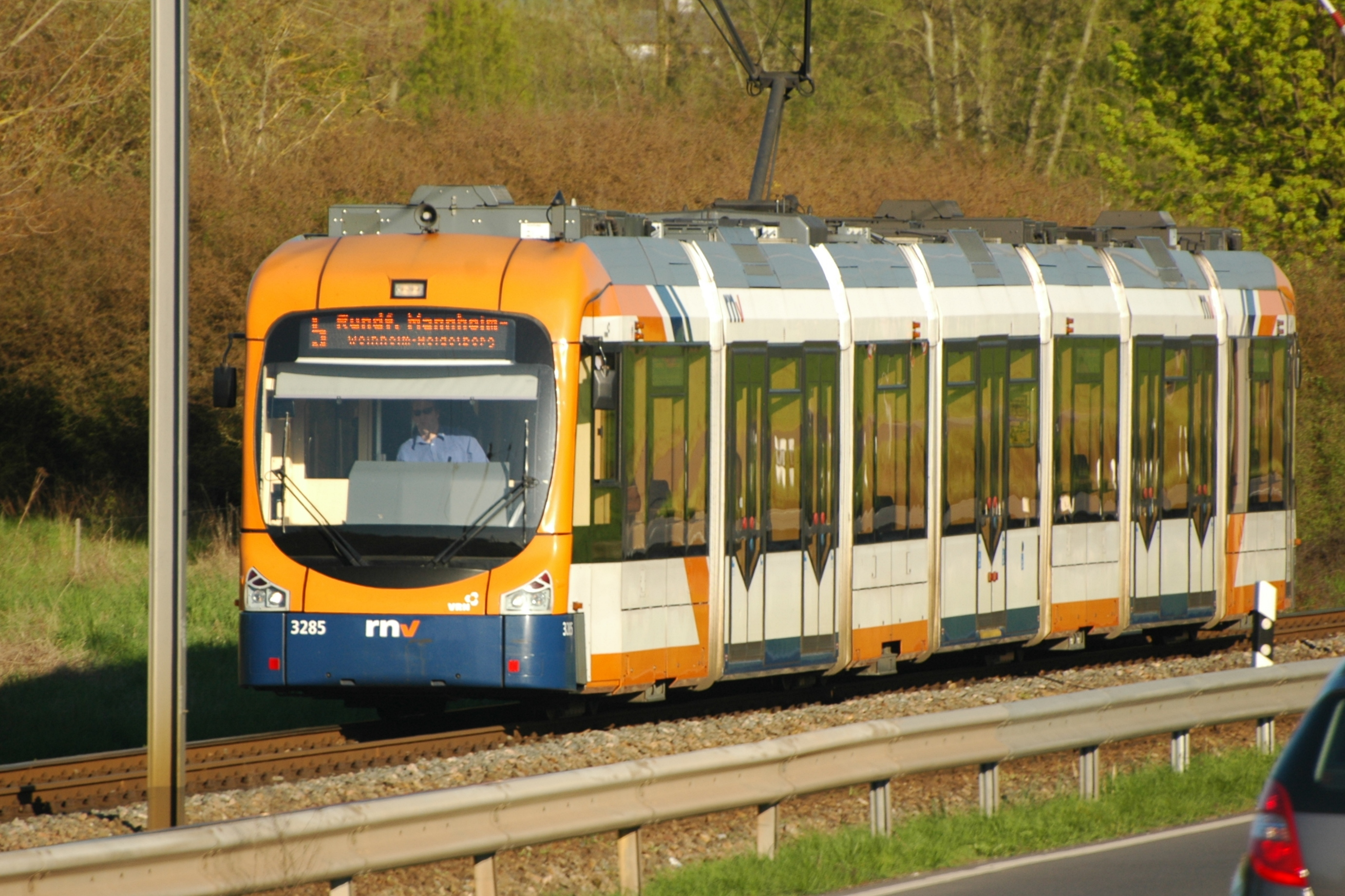 S-Bahn Bombardier RNV8 RNV#3285 in Edingen-Neckarhausen